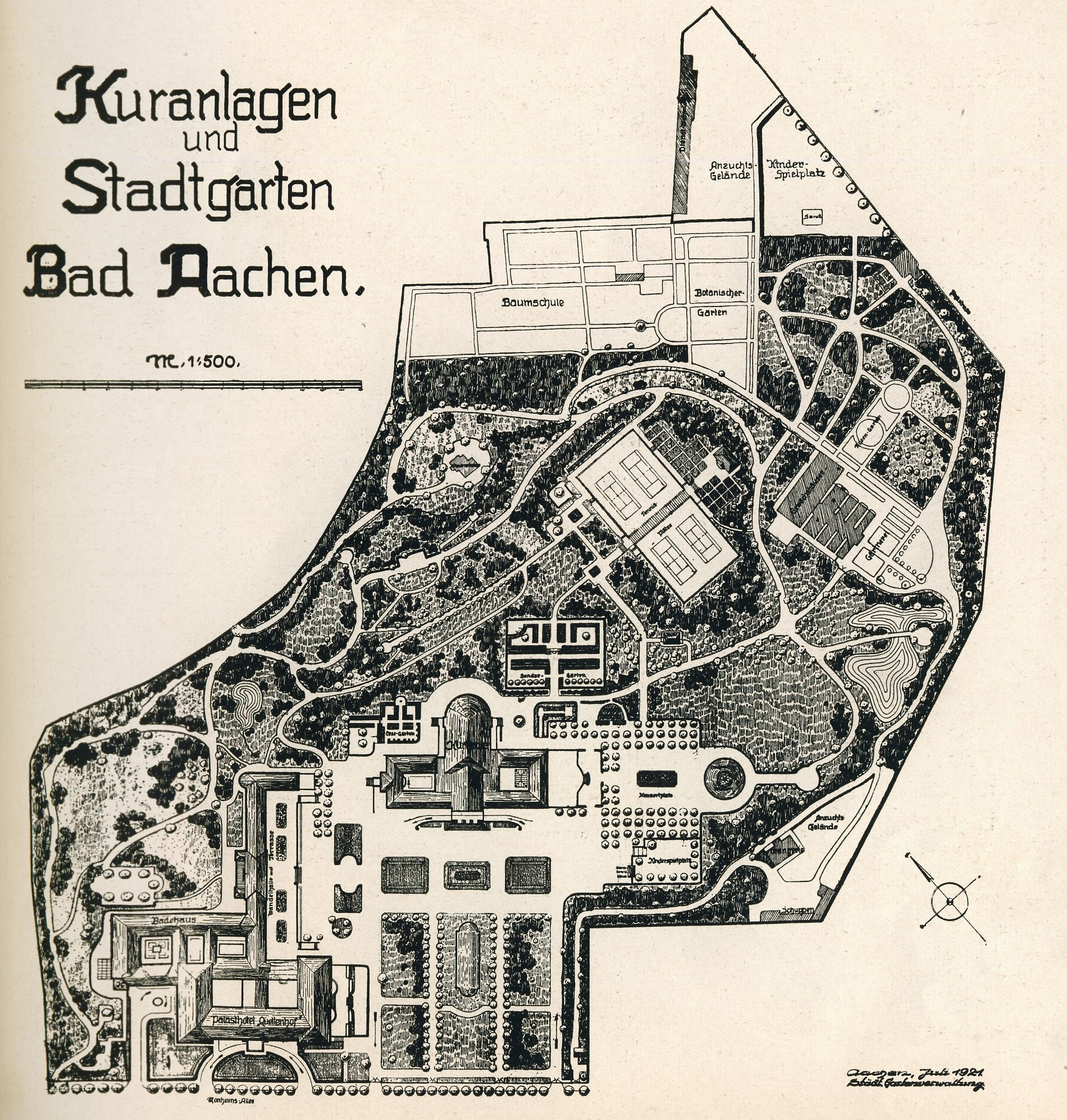 Plan des Aachener Stadtgartens